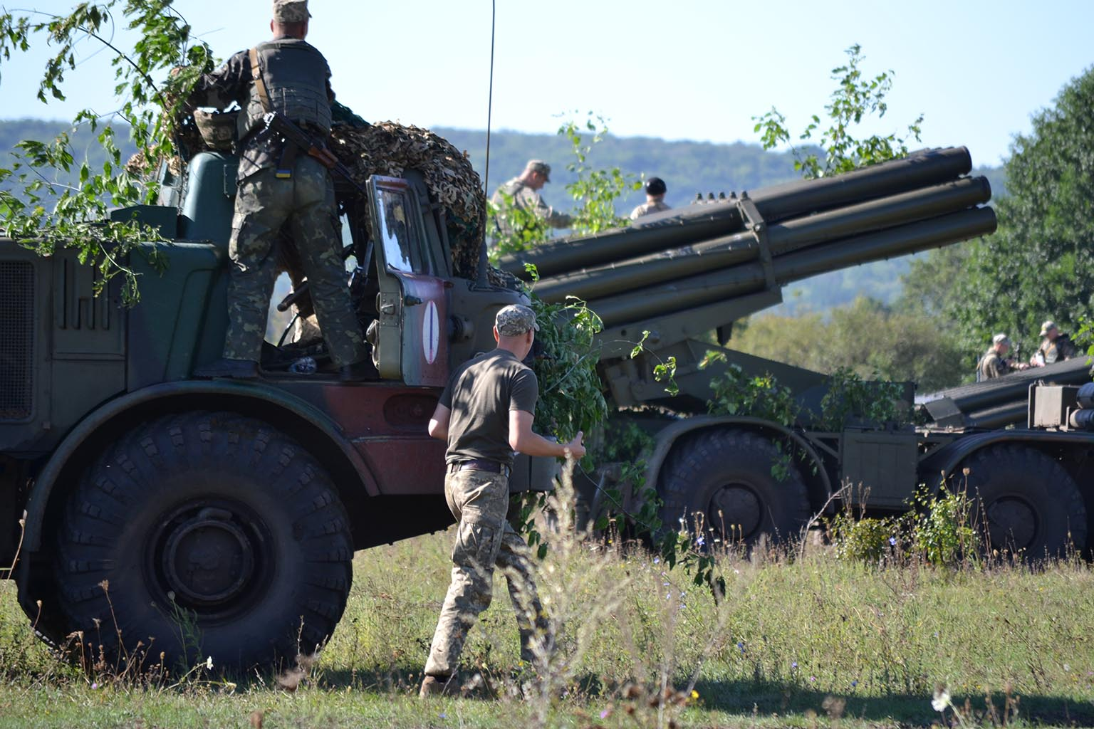 В районі проведення Антитерористичної операції воїни-артилеристи одного із військових з’єднань провели планове тренування з переміщення підрозділу 220-мм реактивних систем залпового вогню 9П140 «Ураган». Під час тренування військові відпрацювали питання щодо роботи пункту управління вогнем, розгортання бойових машин у бойові порядки, наведення на цілі, умовної стрільби й залишення вогневих позицій з поверненням в район тимчасового базування. Слід наголосити, що в інших військових частинах, які виконують завдання в районі проведення АТО тривають інтенсивні планові заходи з бойової та спеціальної підготовки. Автор: Андрій Агєєв